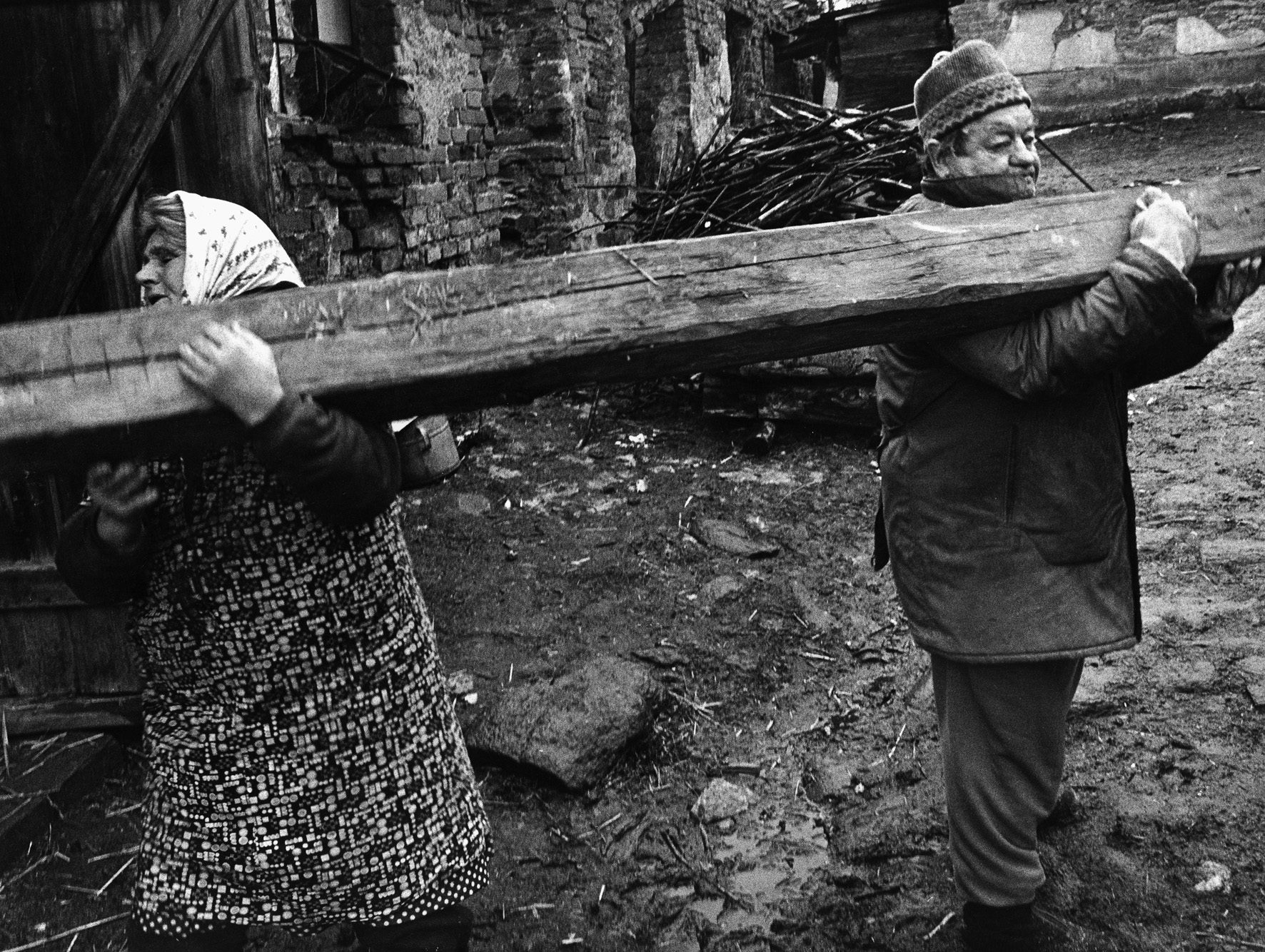 Jindřich Štreit´s archive